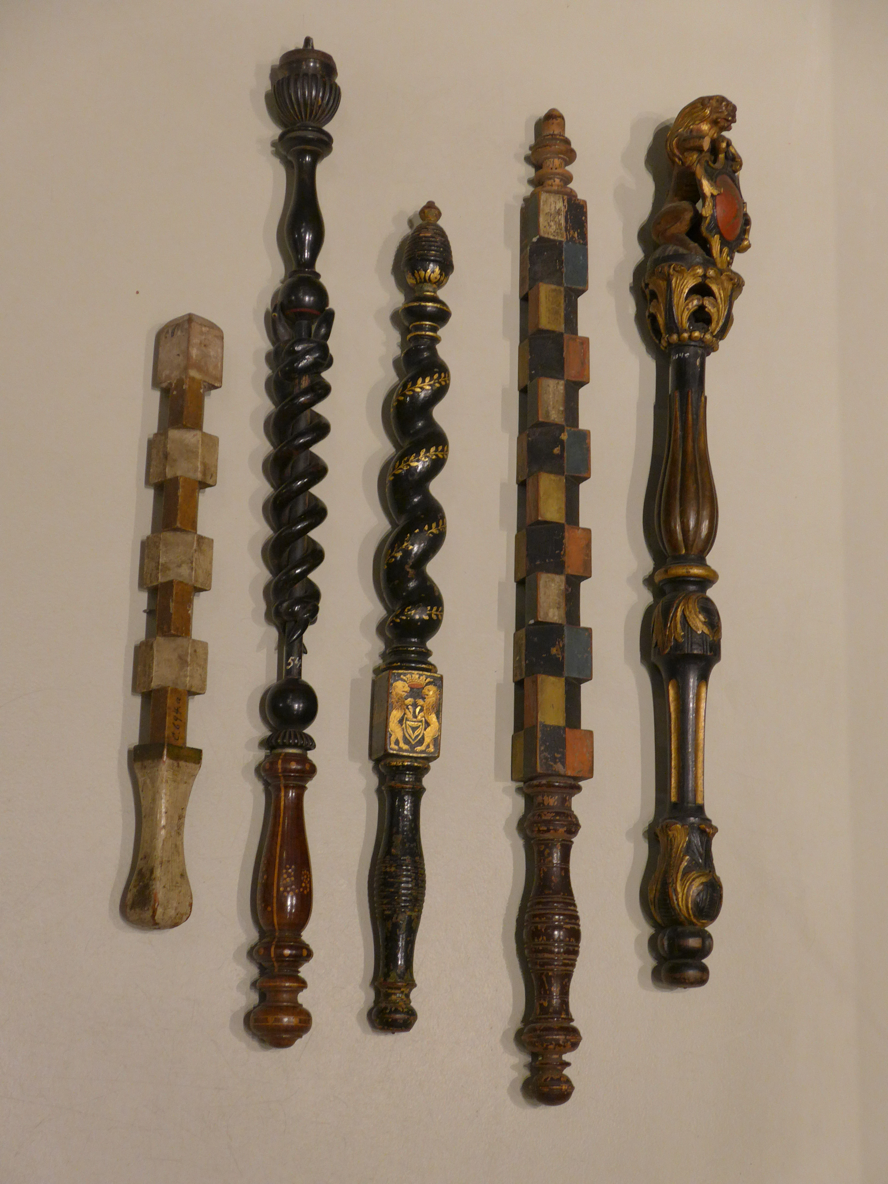 Deutsche Schafferstäbe des 18. und 19. Jahrhunderts aus der Sammlung des Focke-Museums in Bremen. (= Zunftzepter, Rumorstäbe, Regimentshölzer, Swinegel u. a. regionale Bezeichnungen)